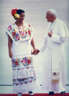 Fotografía de la Gobernadora Dulce María Sauri recibiendo al Papa en Mérida Yucatán en agosto de 1993